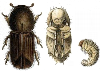 Короед-типограф, его личинка и куколка